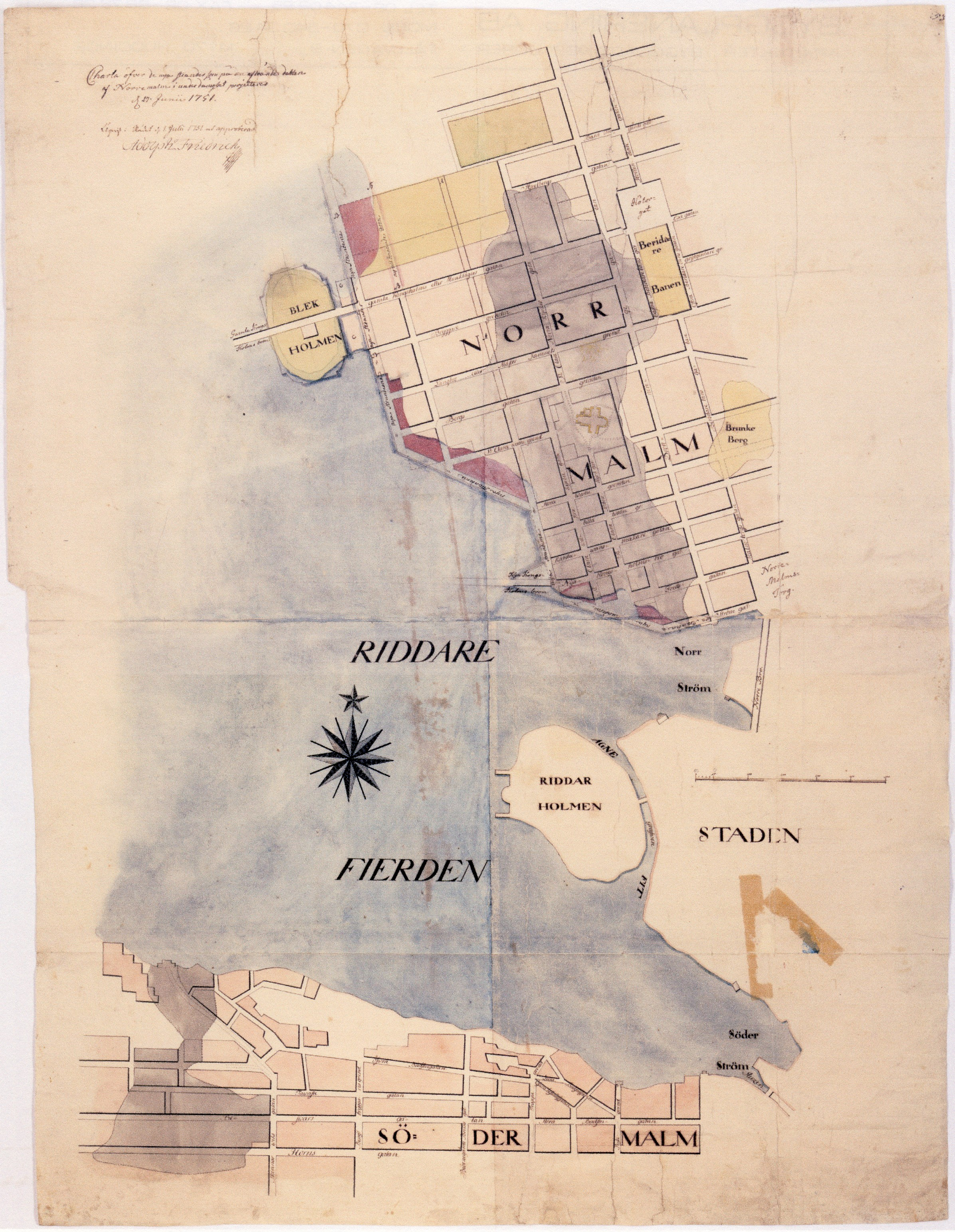 Området för Klarabranden 1751